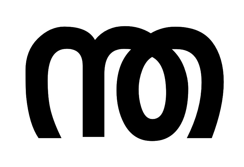 ന്ത മലയാളം അക്ഷരം